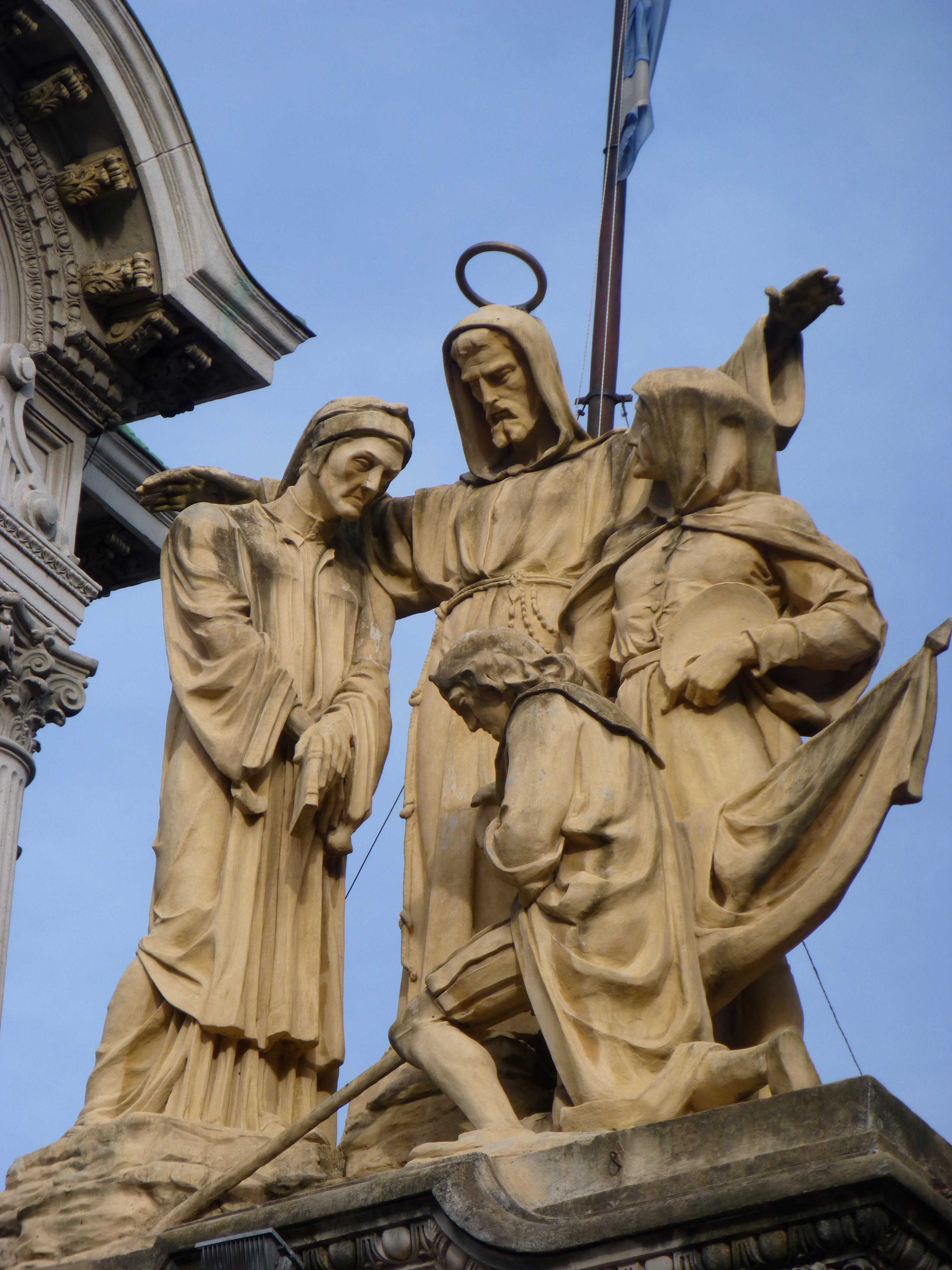 Estatua de Dante Alighieri, Giotto di Bondone y Cristobal Colón, en la Basílica de San Francisco, ubicada en el barrio porteño de Monserrat.